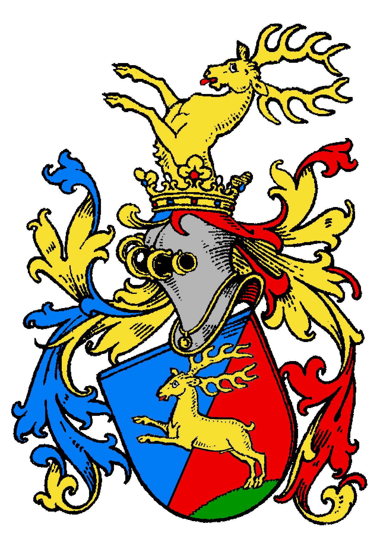 Wappen der von Wenden. Die sichere Stammreihe der Familie beginnt um 1500 mit Matthäus Wendt, Bürger, Seidenhändler und Altermann der Kramerinnung in Stargard. Am 14. November 1699 wurde in Wien durch Kaiser Leopold I. der kurfürstlich brandenburgische Hofrat und Bürgermeister von Stargard, Dr. jur. utr. Matthias Wendt (1645–1718) mit dem Prädikat von Wendten in den rittermäßigen Reichsadelsstand gehoben.